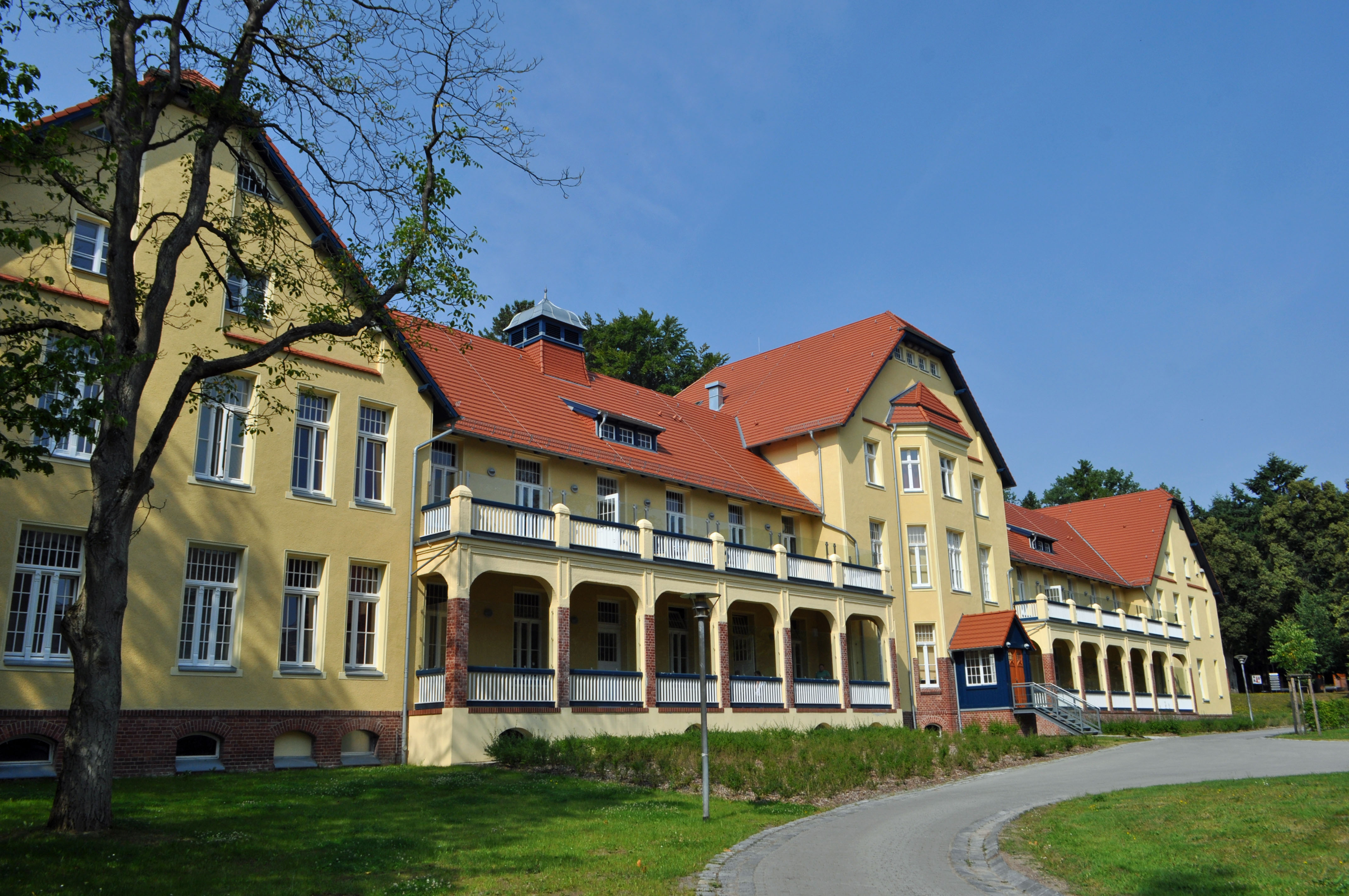 Auf dem Gelände des Krankenhauses "West" (HELIOS Hanseklinikum, West, Rostocker Chaussee 70, in Stralsund). Haus Nr. ??